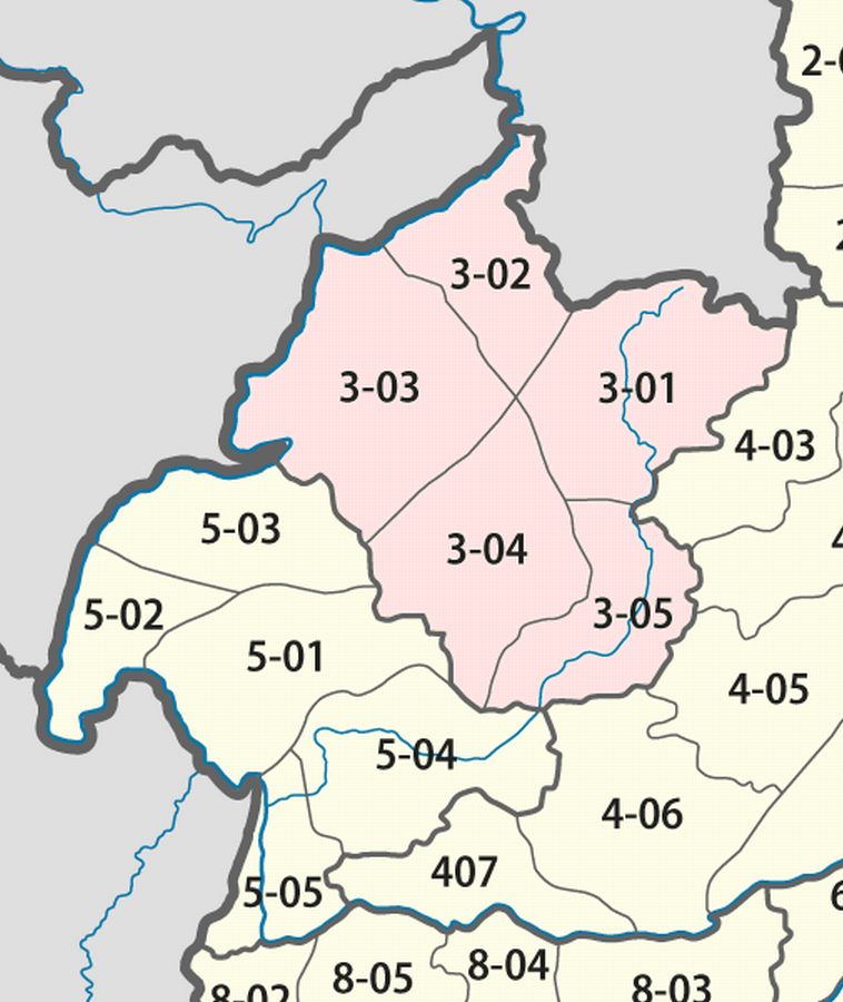 Giấy phép